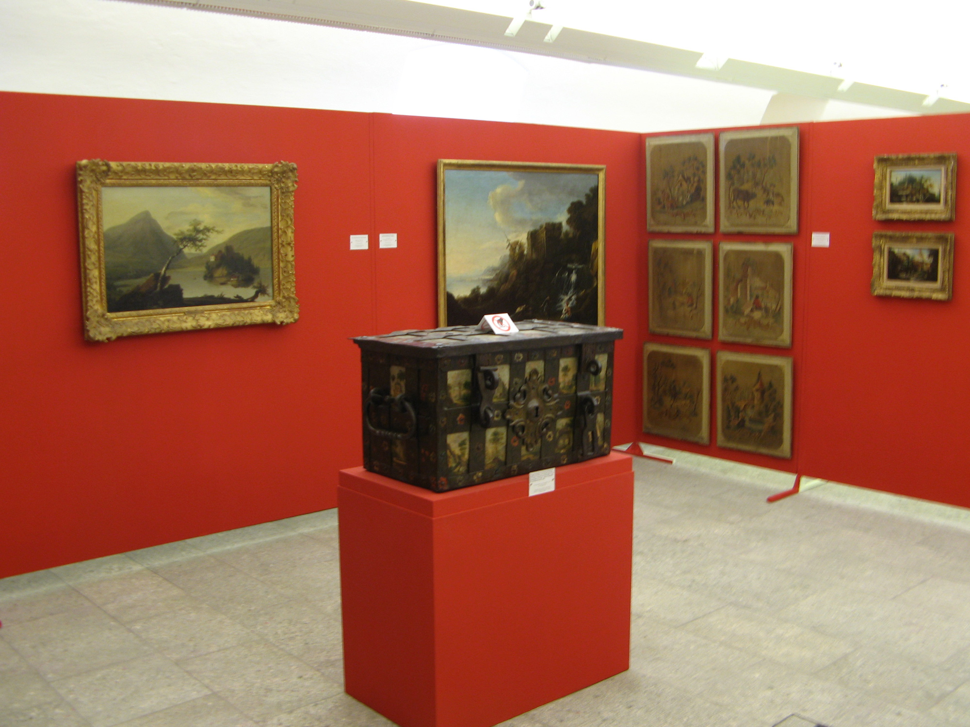 Caspar-Wolf-Kabinett im Gewölbekeller des Klosters Muri